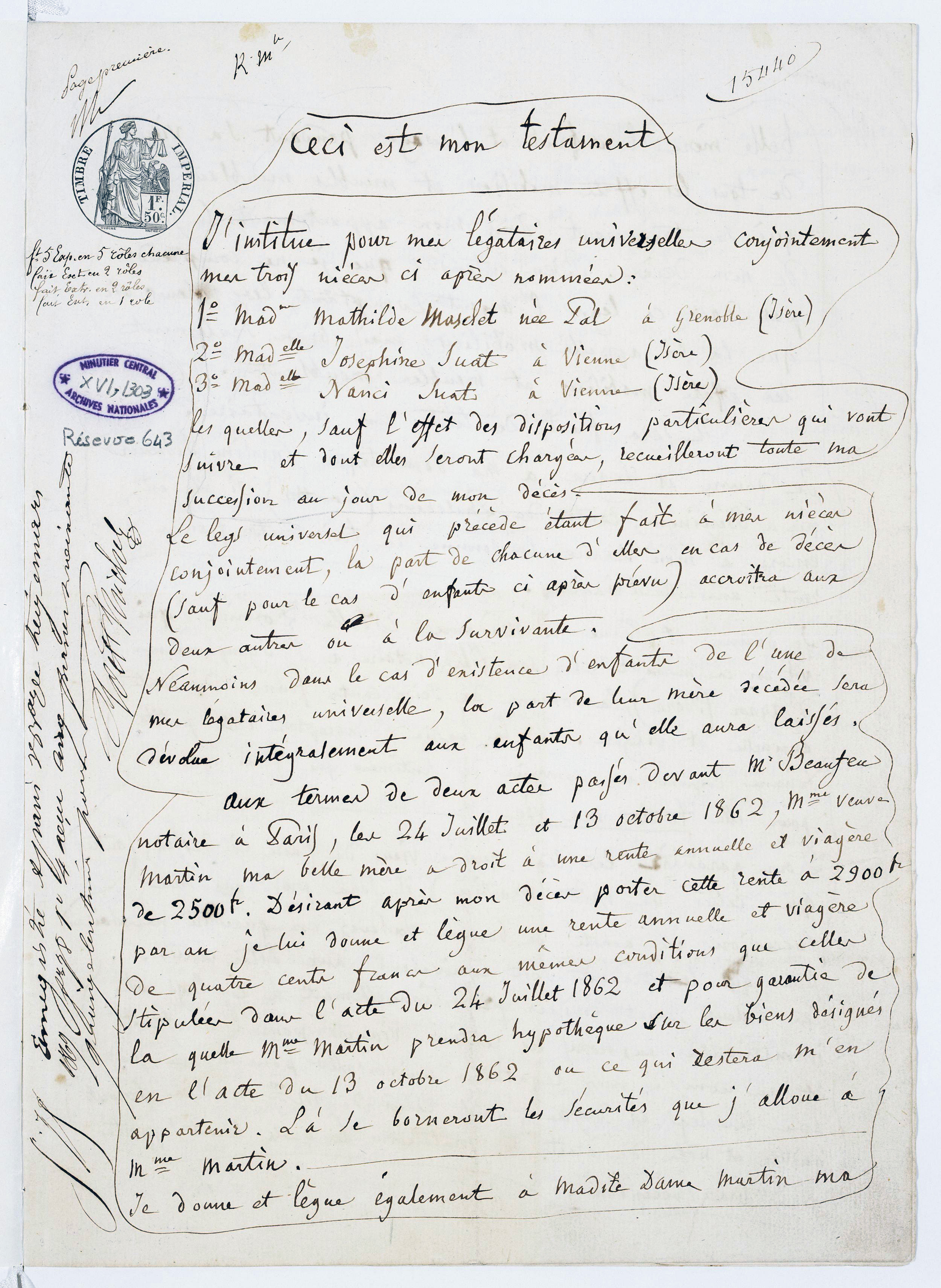 Testament olographe d'Hector Berlioz, première page